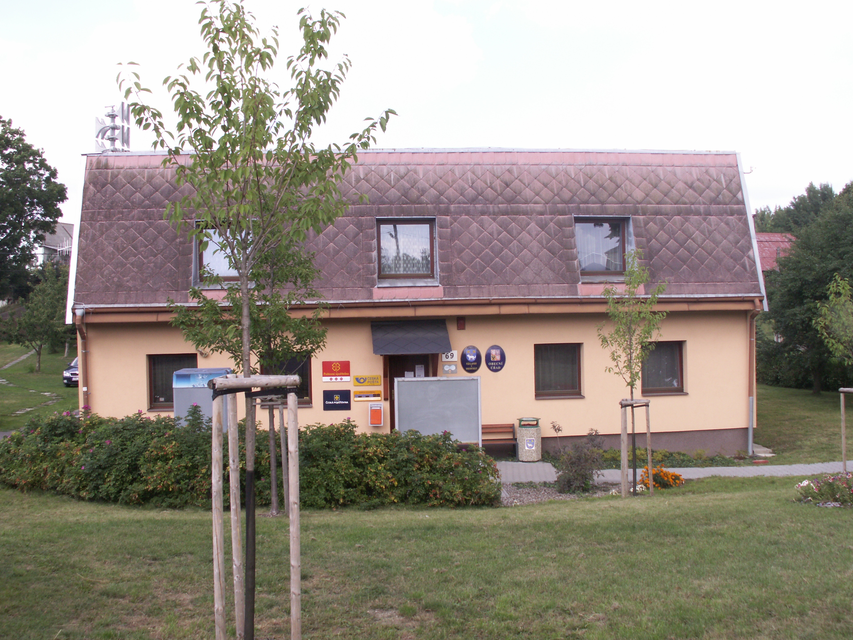 Václavov u Bruntálu, okres Bruntál, Moravskoslezský kraj, budova obecního úřadu v části Horní Václavov